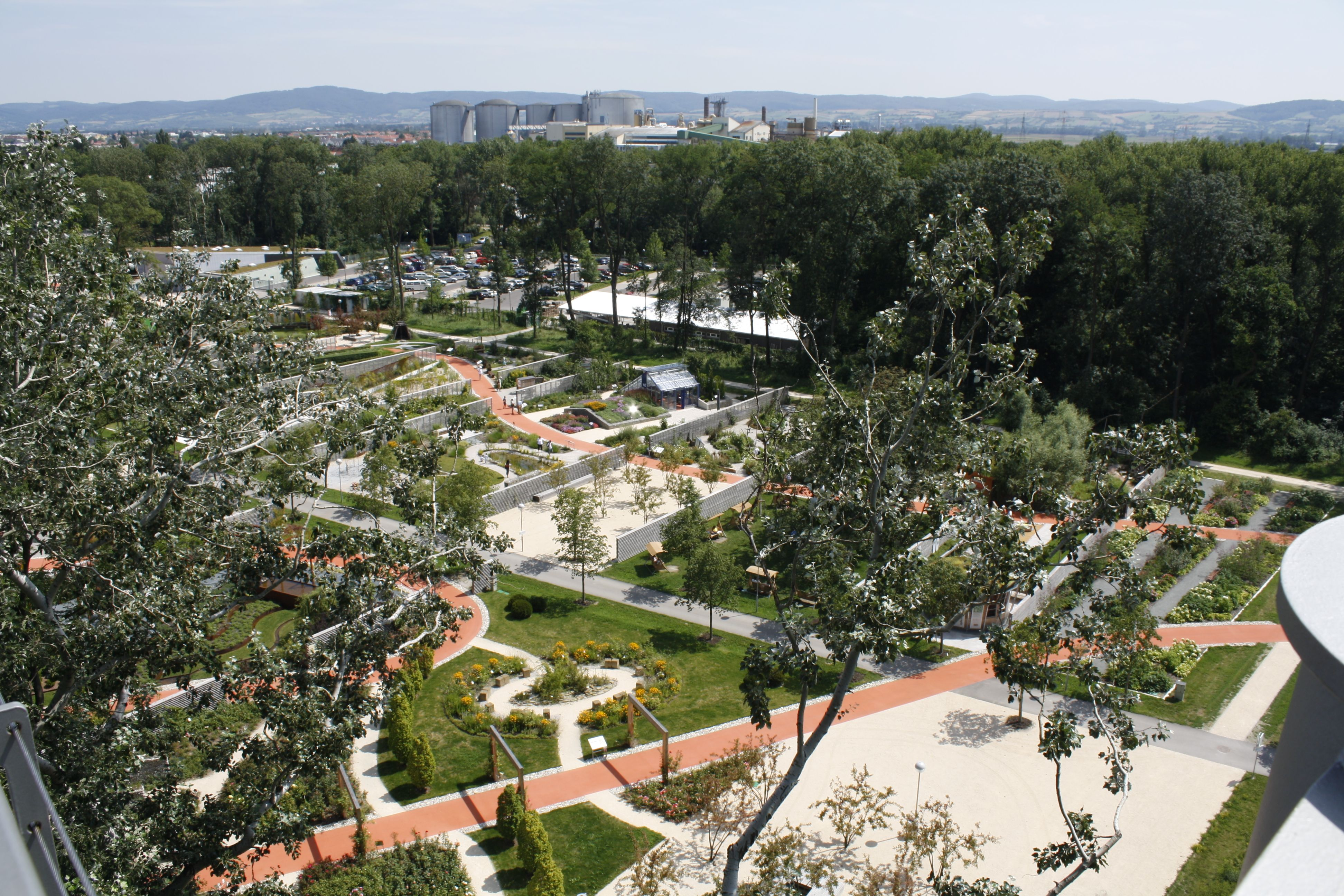 NÖ Landesgartenschau Garten Tulln 2009 in Tulln an der Donau in Niederösterreich